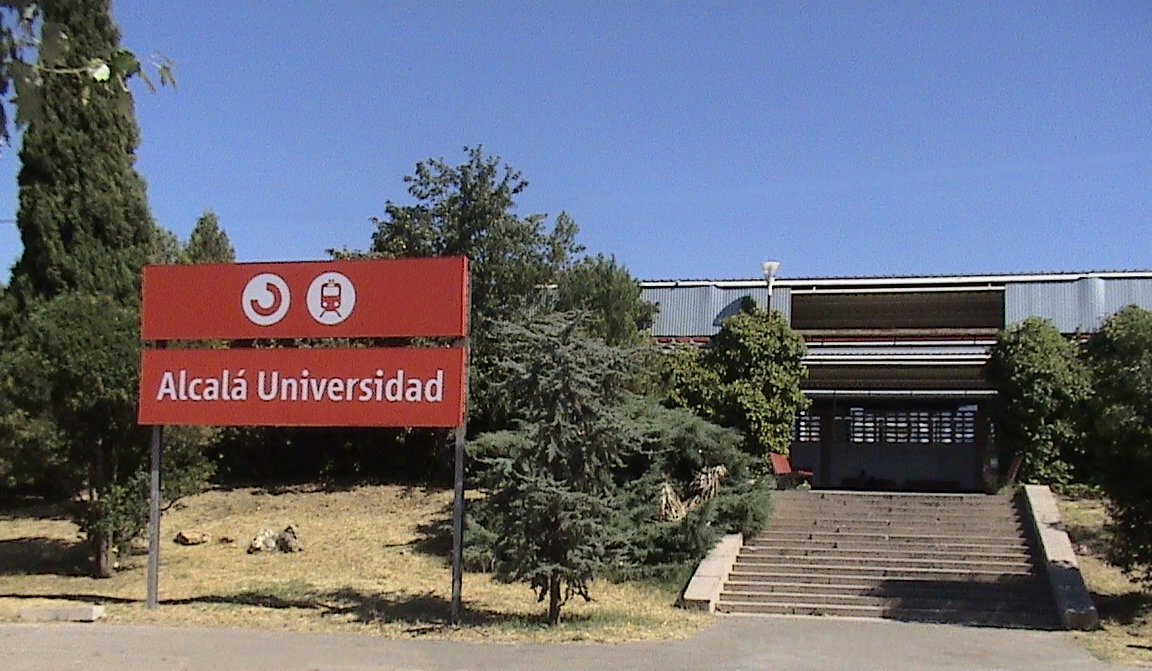 Entrada a la Estación de trenes de Alcalá-Universidad, en Alcalá de Henares (Comunidad de Madrid - España) inaugurada en 1975. Situada entre el Campus de la Universidad de Alcalá y el Centro Comercial Cuadernillos.